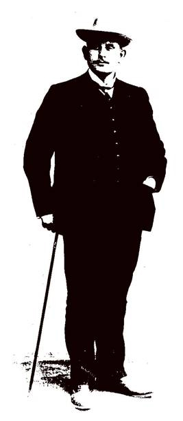 Jules Godart (1877-1909). Photographie d'un chanteur d'opéra décédé en 1909, tombée dans le domaine public